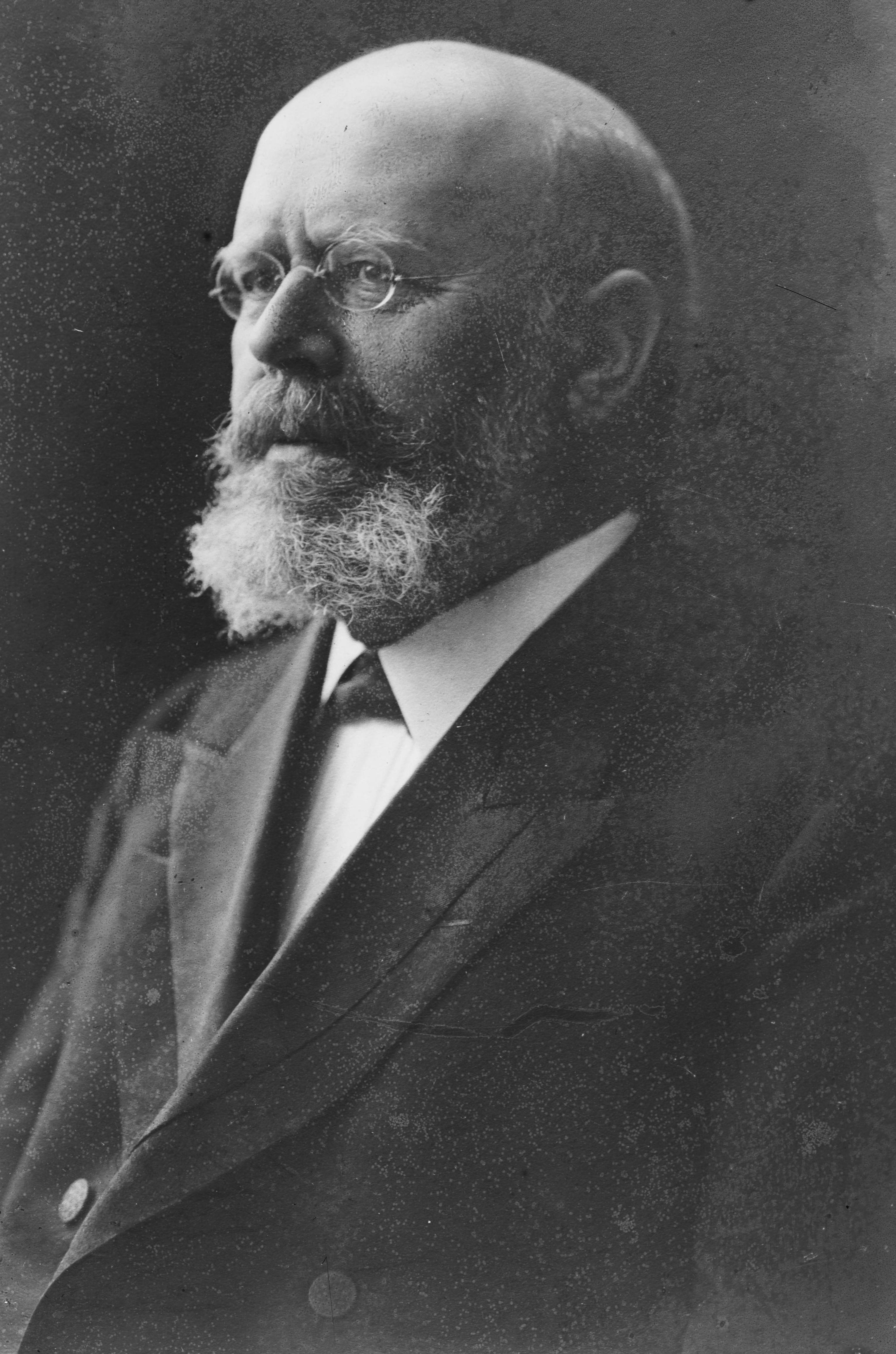 Bildet er hentet fra Nasjonalbibliotekets bildesamling. Anmerkninger til bildet var: Påskrift arkivark: J. Løvland Arkivnummer: 439 Depicted person: Løvland, Jørgen Gunnarson